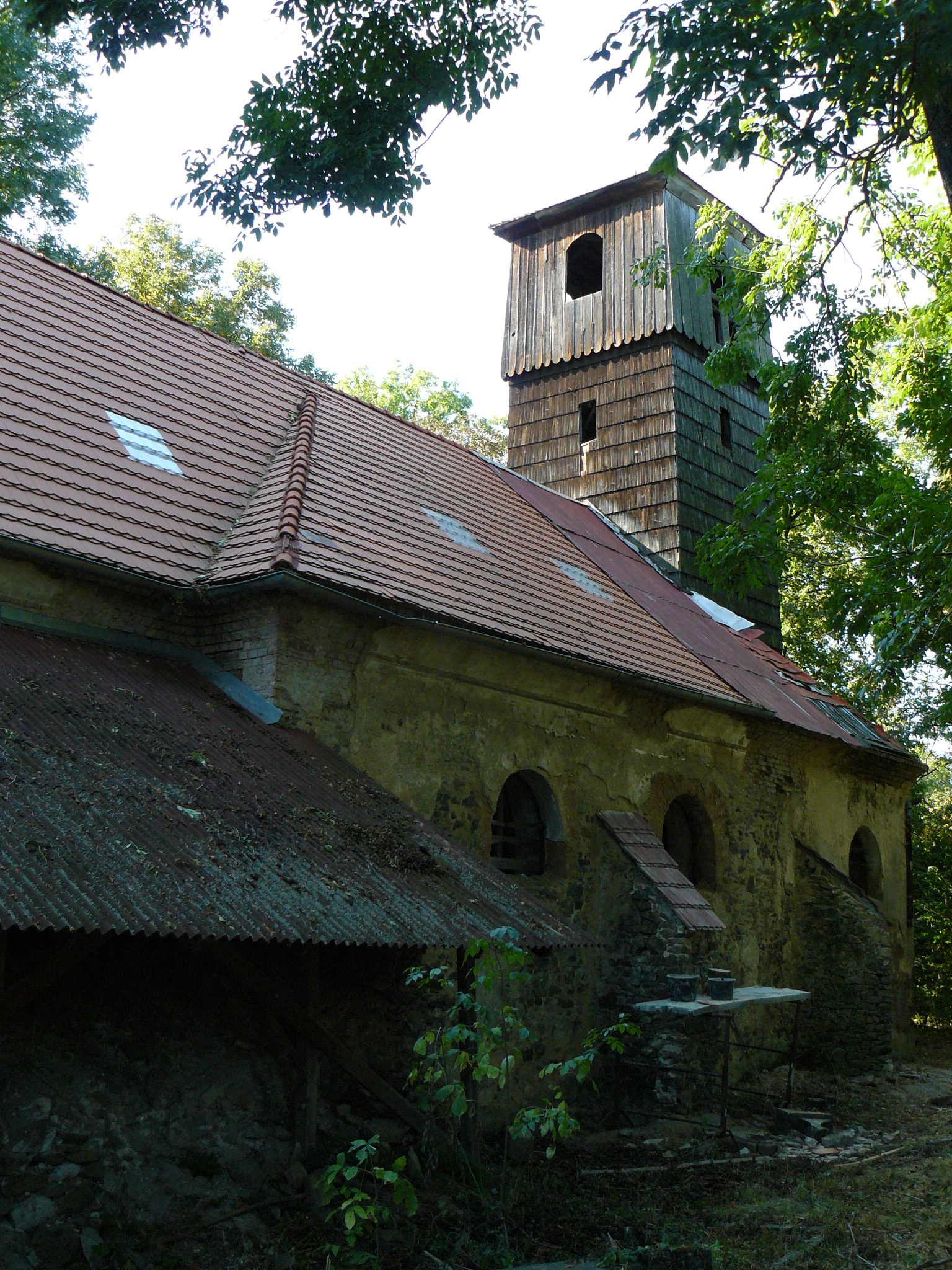 Polorozbořený kostel sv. Jiří v zaniklé vesnici Pelhřimovy v dnešním k.ú. Slezské Rudoltice. Polská část vesnice se zachovala s názvem Pielgrzymów.